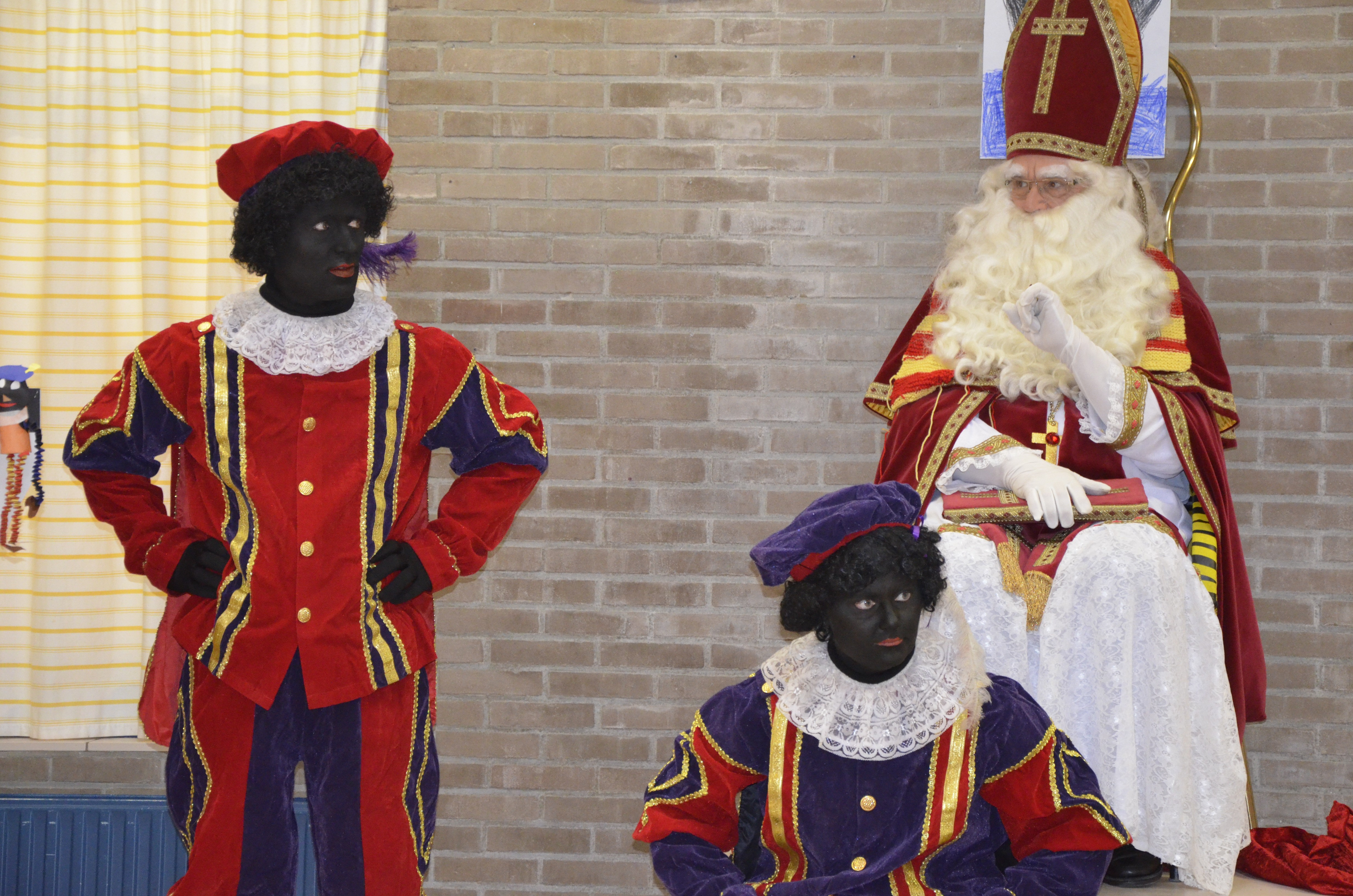 Sinterklaas 2012, groep 3